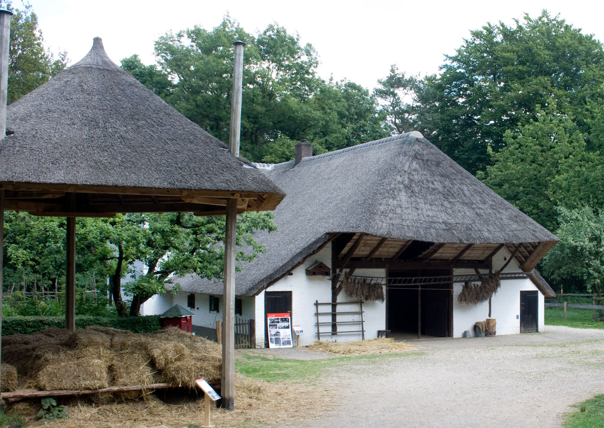 Boerderij Varik,1910, 1.13 061Boerderij (varik)